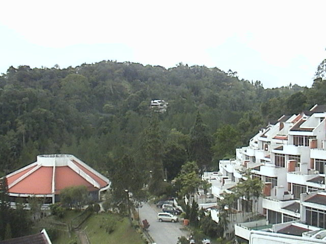 Pemandangan Bukit Fraser yang dipenuhi dengan hotel dan apartment untuk pengunjung